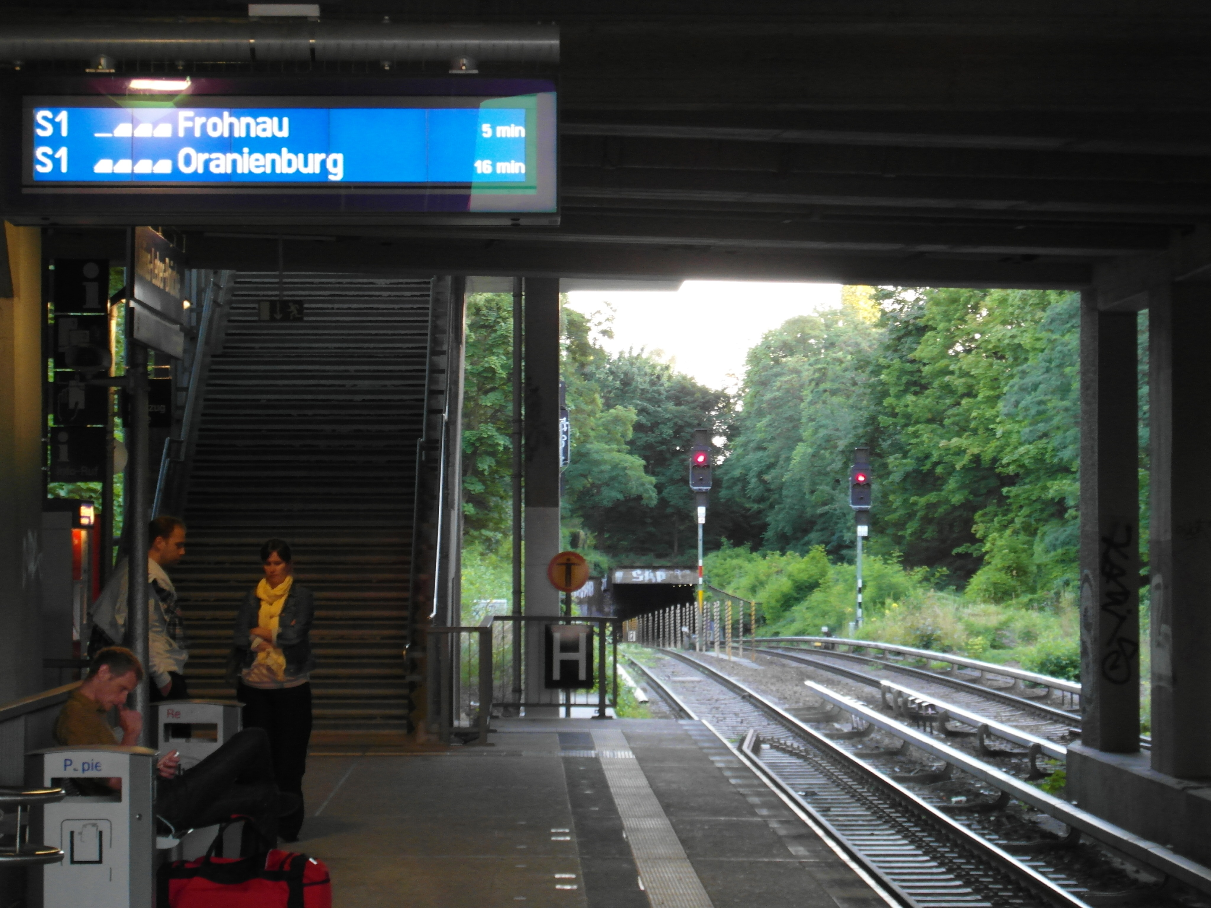 Berlin - S-Bahnhof Julius-Leber-Brücke - Linie S1